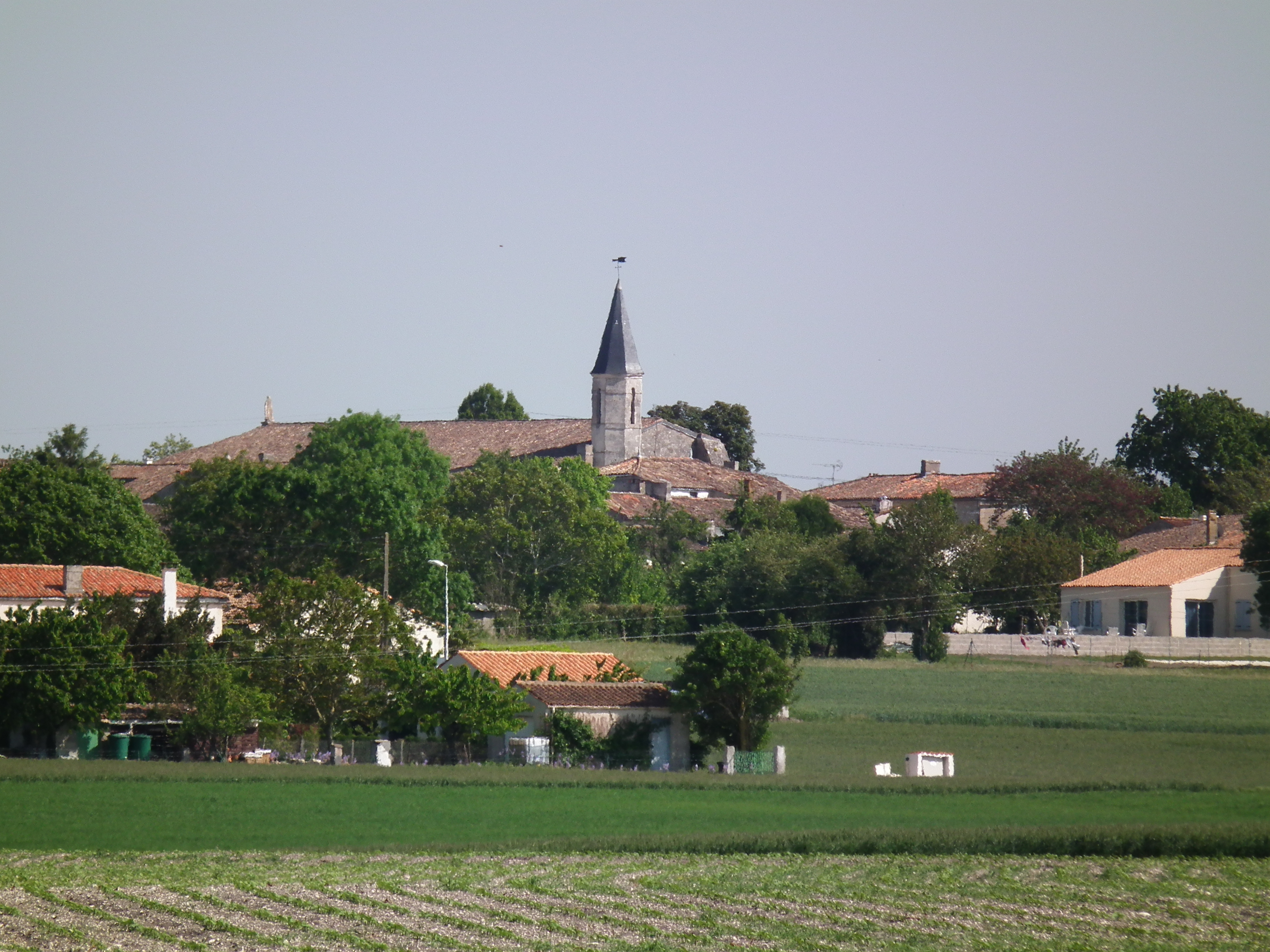 Vue du village de Grézac (Charente-Maritime)